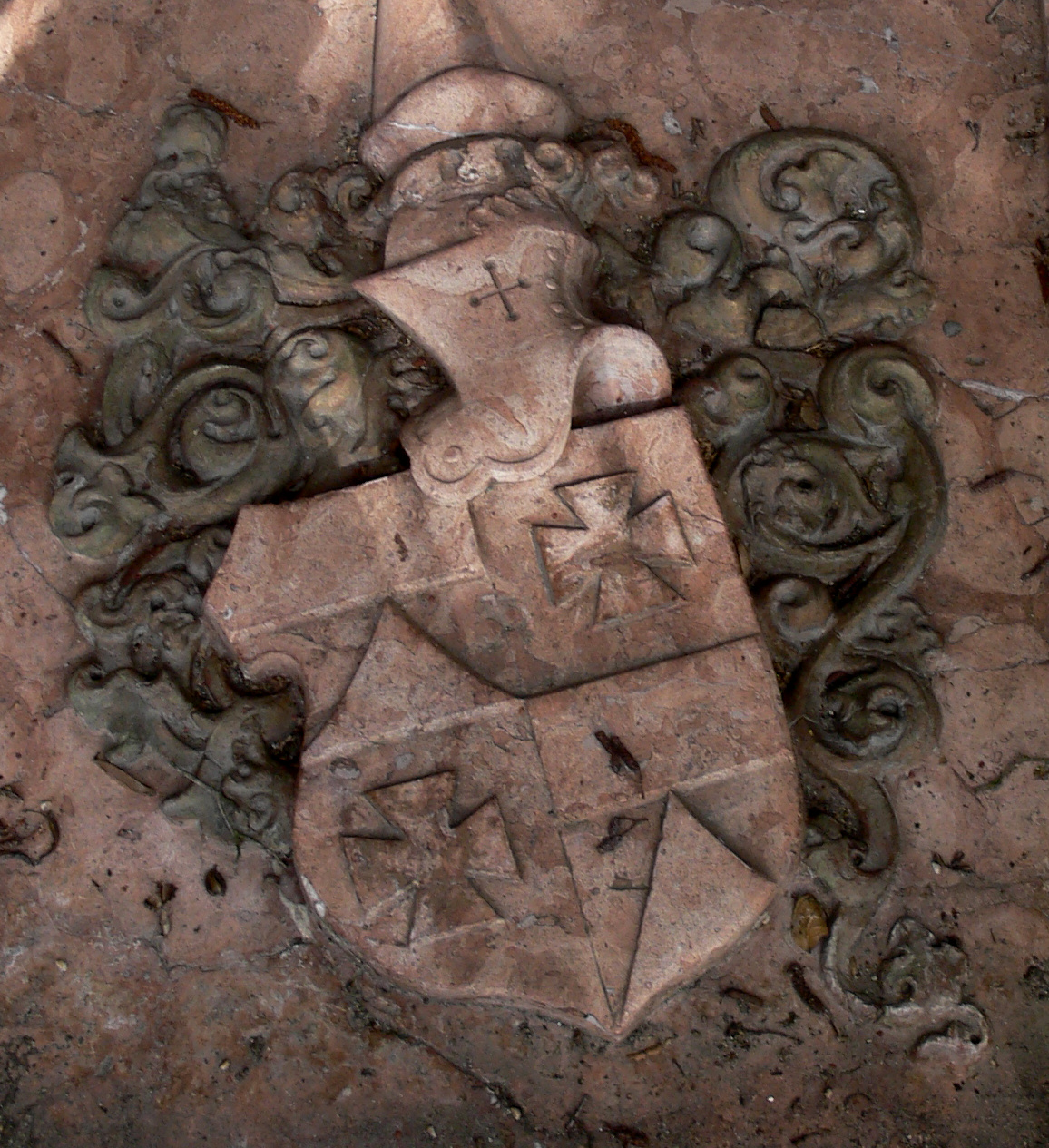 Friedhof in Meersburg (Bodenseekreis) Grabstätte Joseph von Laßberg, Wappen